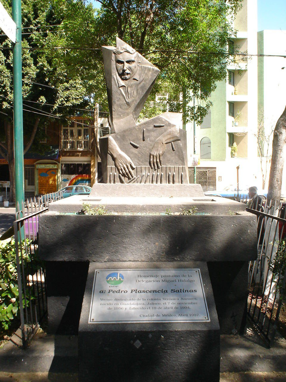 ESCULTURA DE PEDRO SALINAS PLASCENCIA. Obra realizada por el escultor Jorge Gonzalez Velazquez de la Ciudad de Mexico